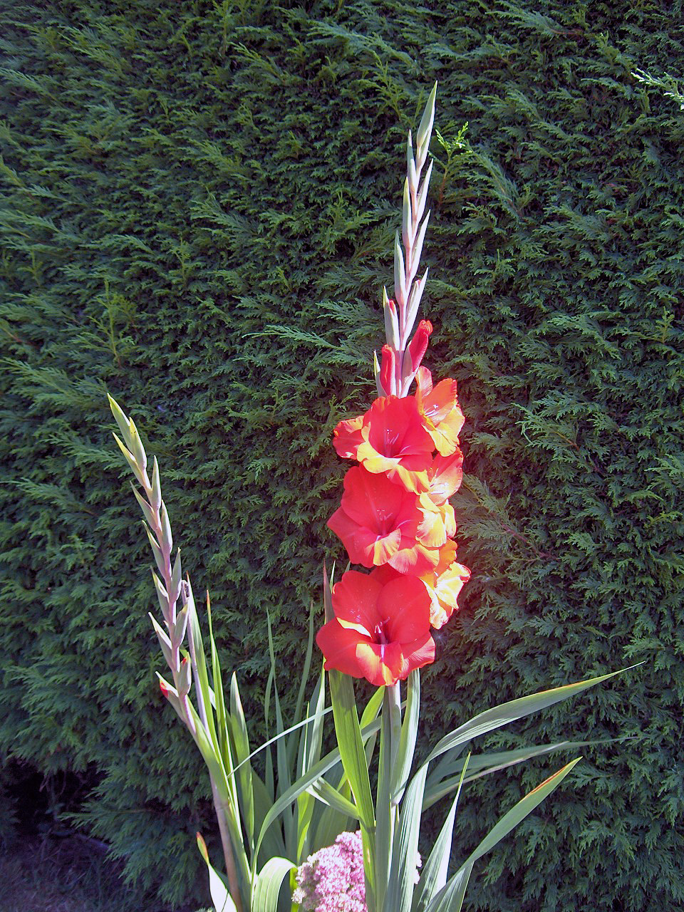 Cultivar Gladiolus 'Red Cascade' Family Iridaceae